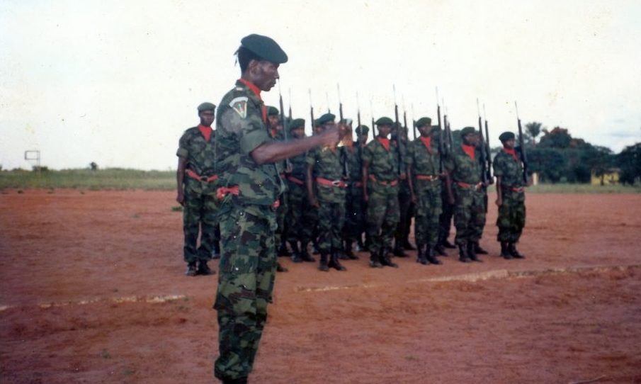 Parade pour la remise des brevets commando à la première promotion de la Garde Civile à Kota-Koli